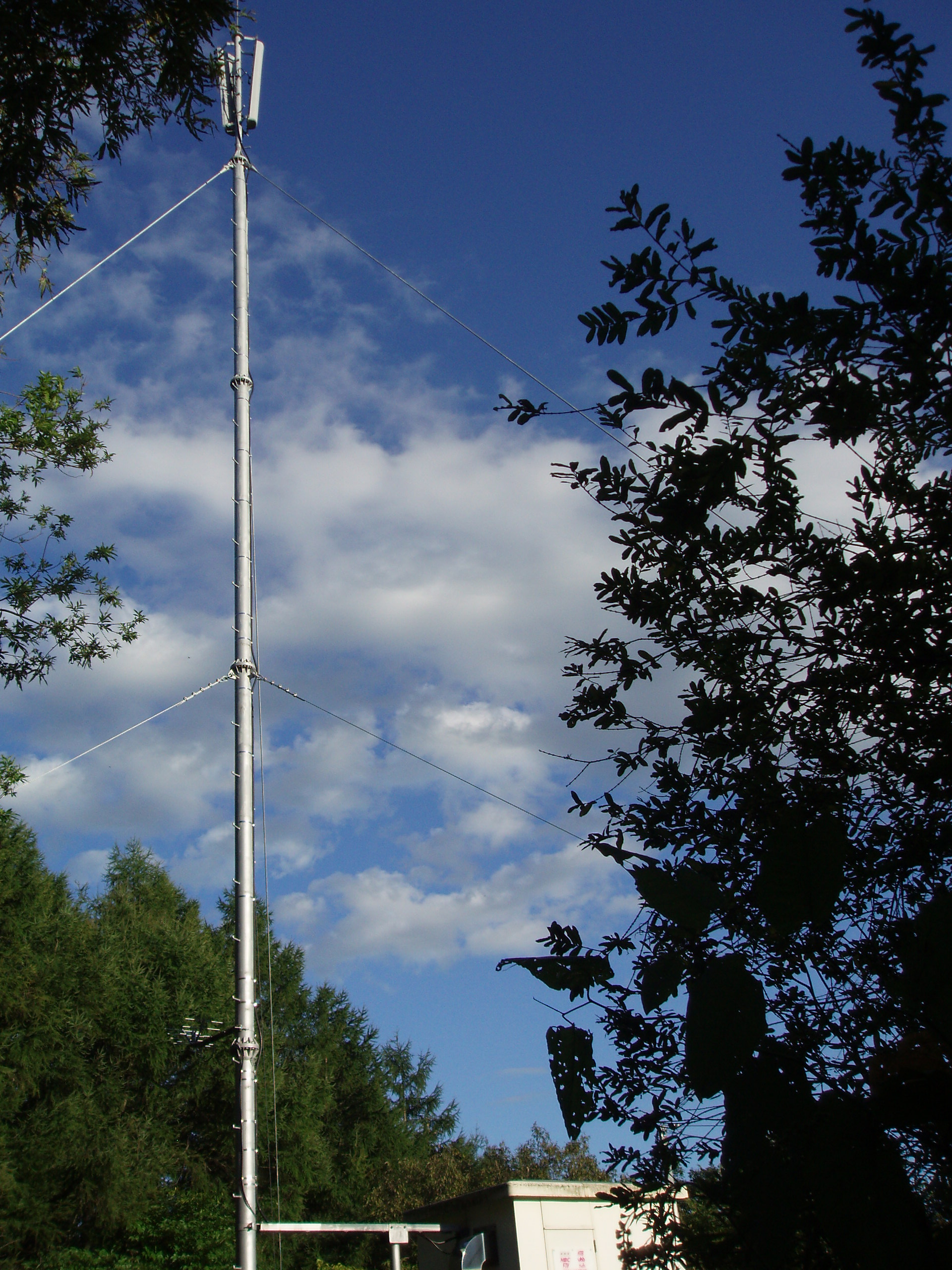 壮瞥中継局